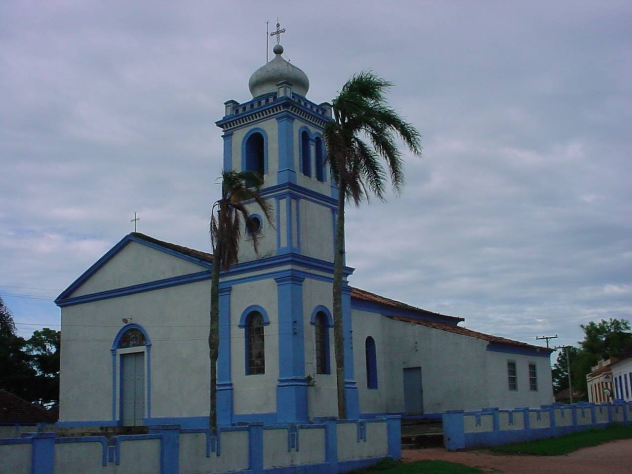 Igreja em homenagem à Nossa Senhora da Conceição no distrito do Boqueirão na cidade de São Lourenço do Sul/RS, Brasil (2006)